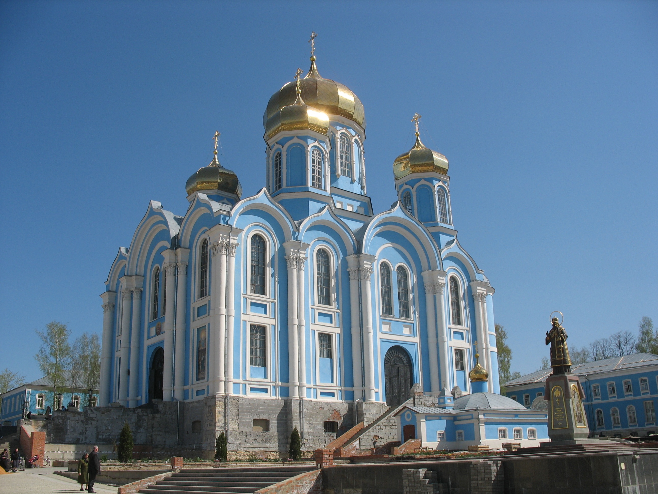 Собор Владимирской иконы Божьей матери